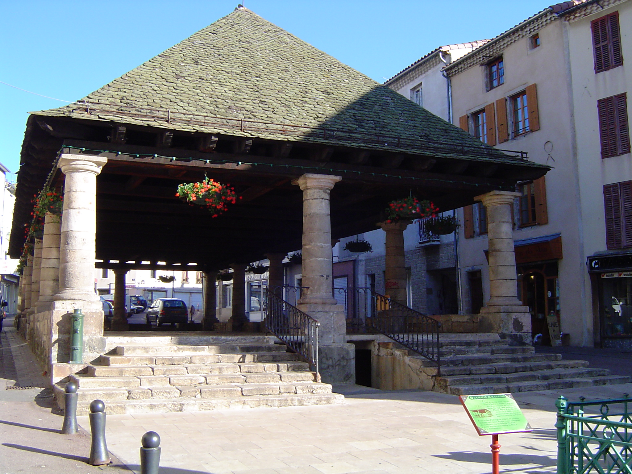 Halles de Langogne